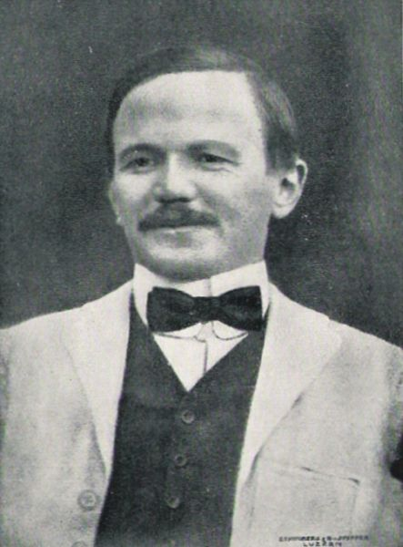 Porträt von Edouard Huber (1879-1914)